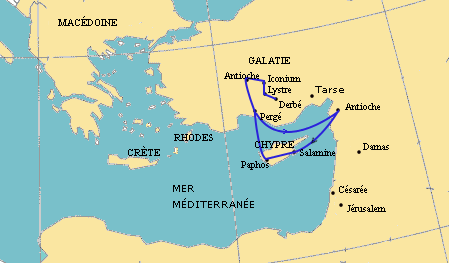 Voyage de Paul (premier). Image créée avec Gimp à partir d'un fond de carte fourni par l'espace cartographie du site sciences-po. Domaine Public